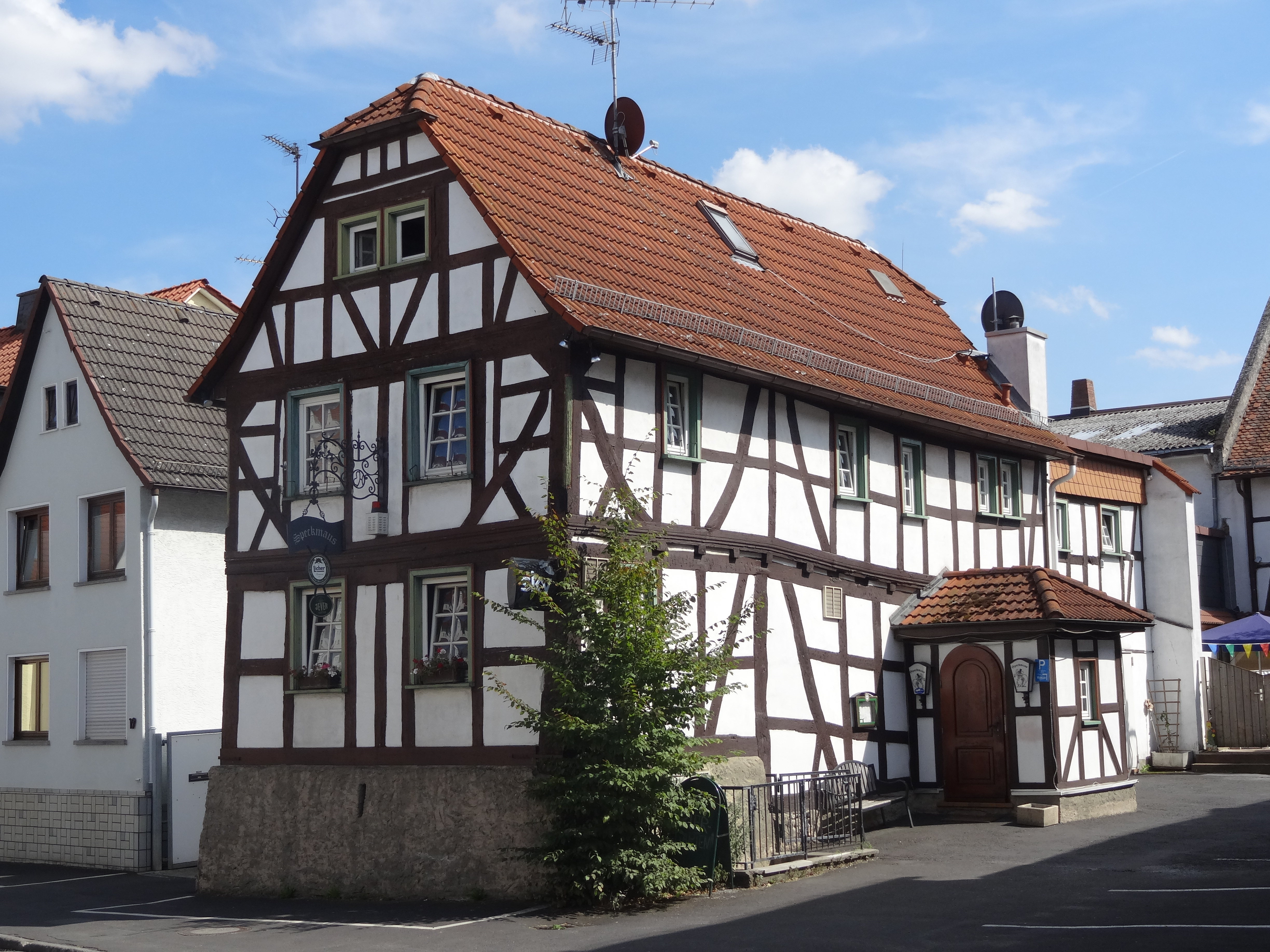 Fachwerkwohnhaus, Moorgasse 17, 35428 Langgöns